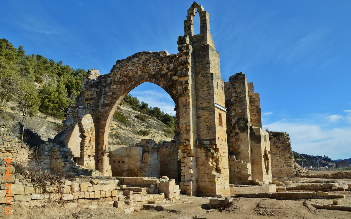 Restes del monestir de Vallsanta (Guimerà)